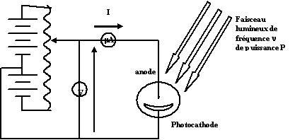 cellule photoélectrique bien clair